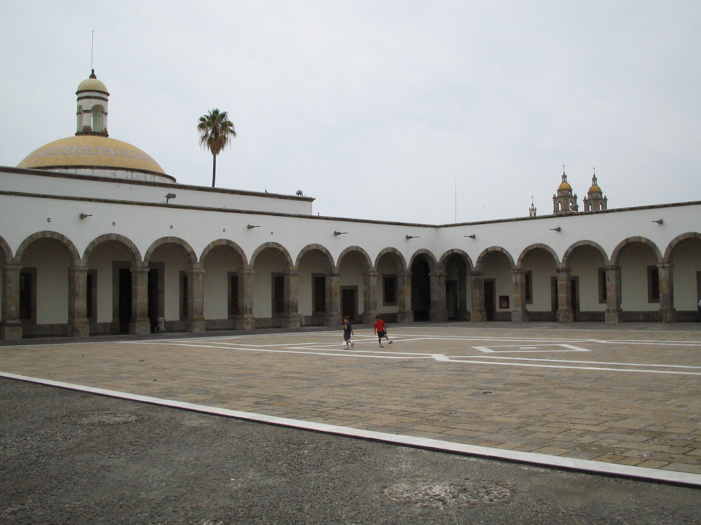 One of the yards inside Hospicio Cabañas, Guadalajara, Jalisco, Mexico.